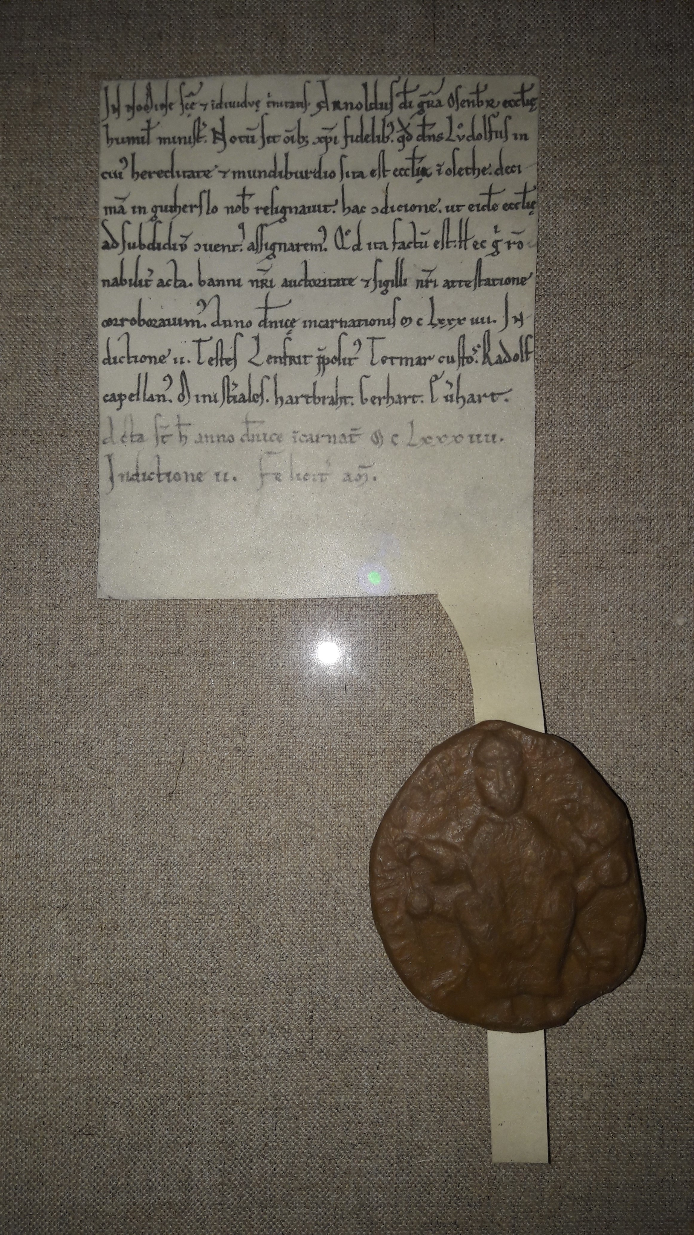 Erste urkundlicher Nachweis des Namens "gutherlo". Diese hängt im Eingangsbereich des Stadtarchives Gütersloh aus.